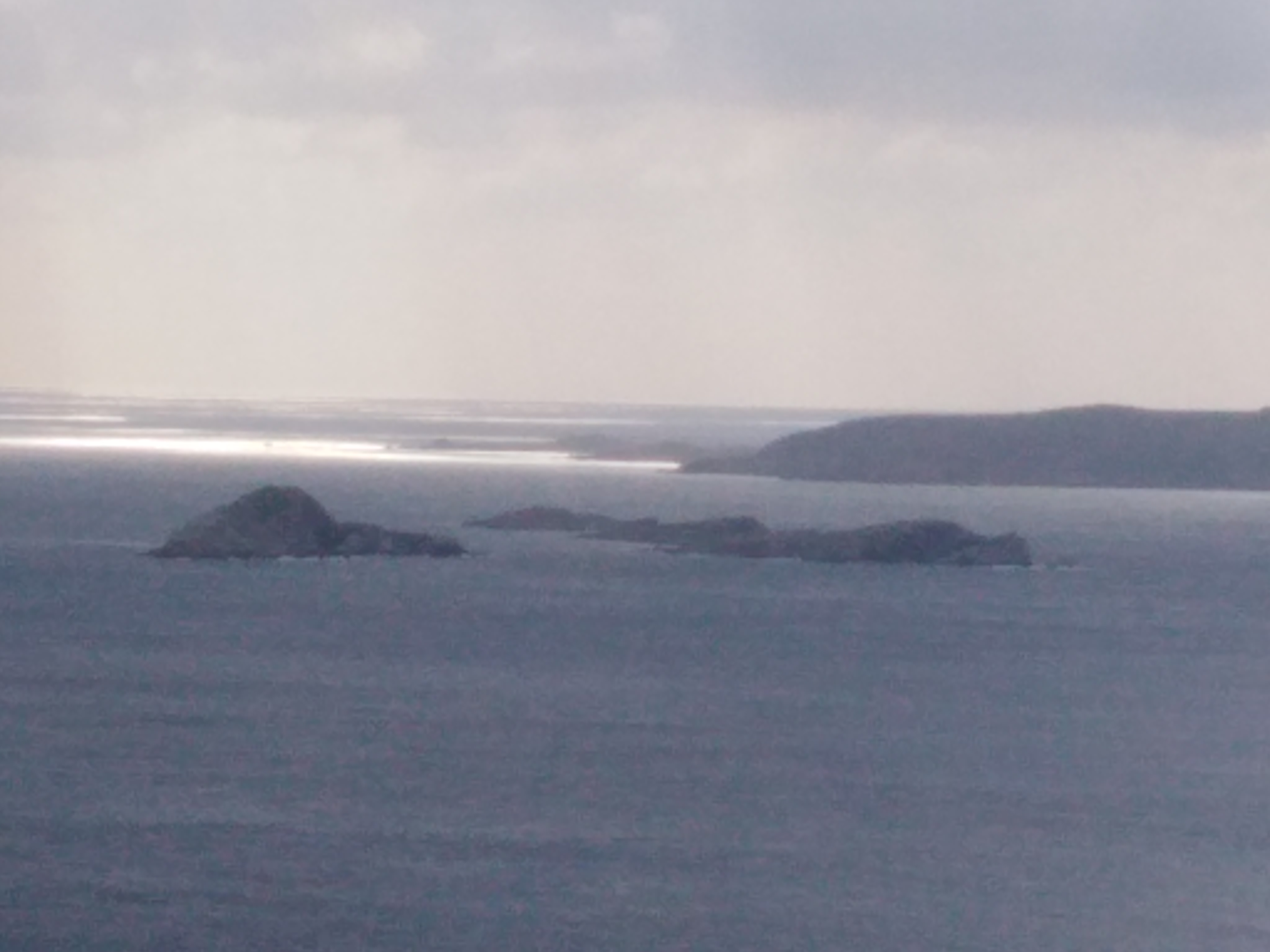 Η Νησίδες Πρασονήσια στην Μύκονο